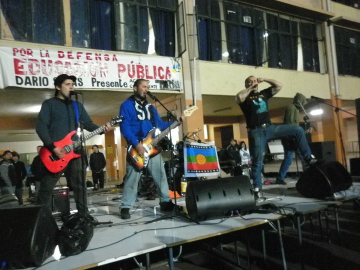 La foto fue tomada el día sábado dos de julio del 2011. En ella se aprecia la presentación de la banda Guardia Bermellón en el Colegio Darío Salas (Santiago, Chile) en un festival por la Educación Pública, gratuita y de calidad en el marco de las movilizaciones estudiantes en Chile.